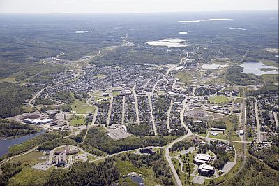 Kirkland Lake Aerial View